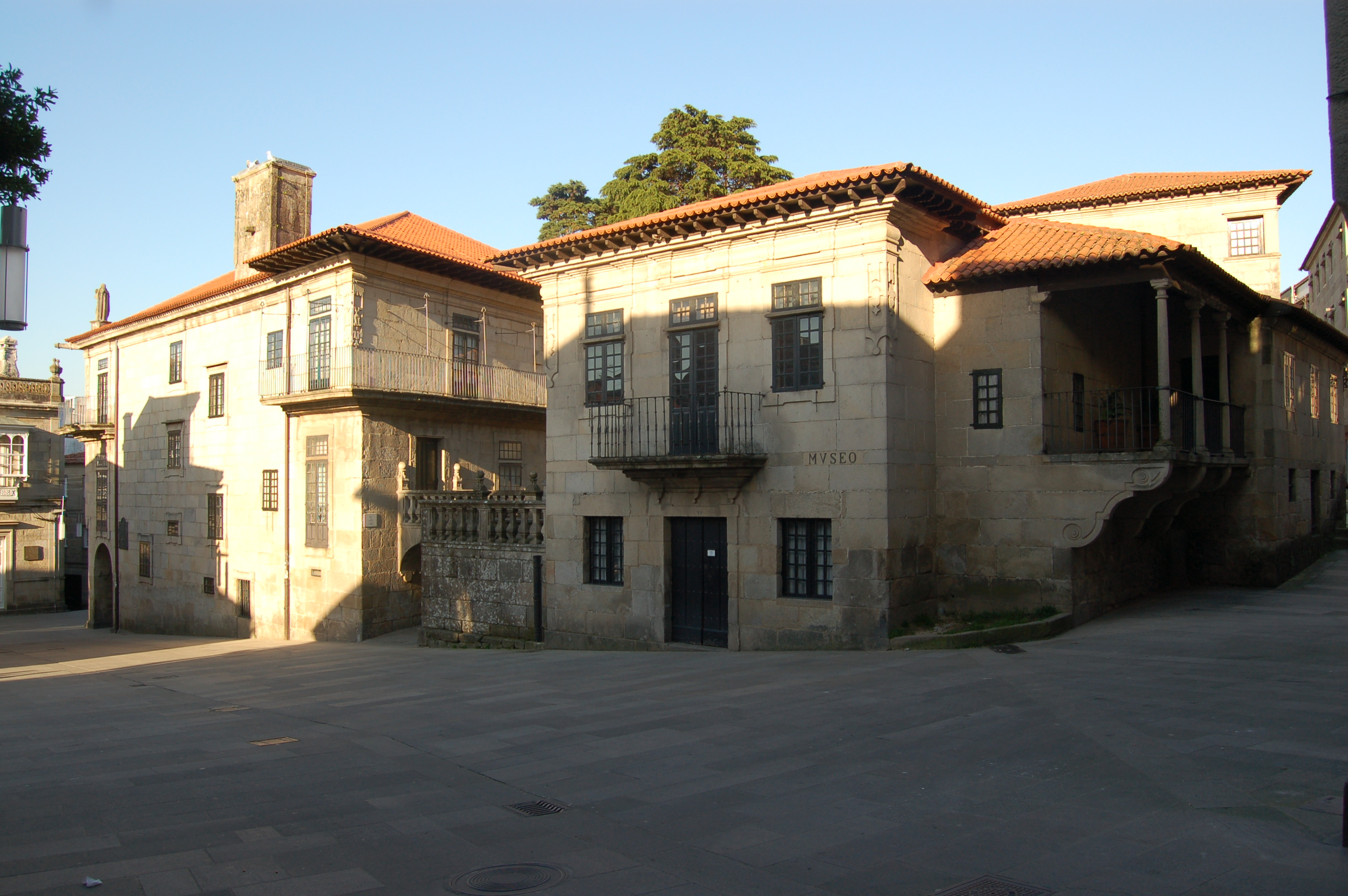 Museo Provincial de Pontevedra; edificios Castro Monteagudo e García Flórez